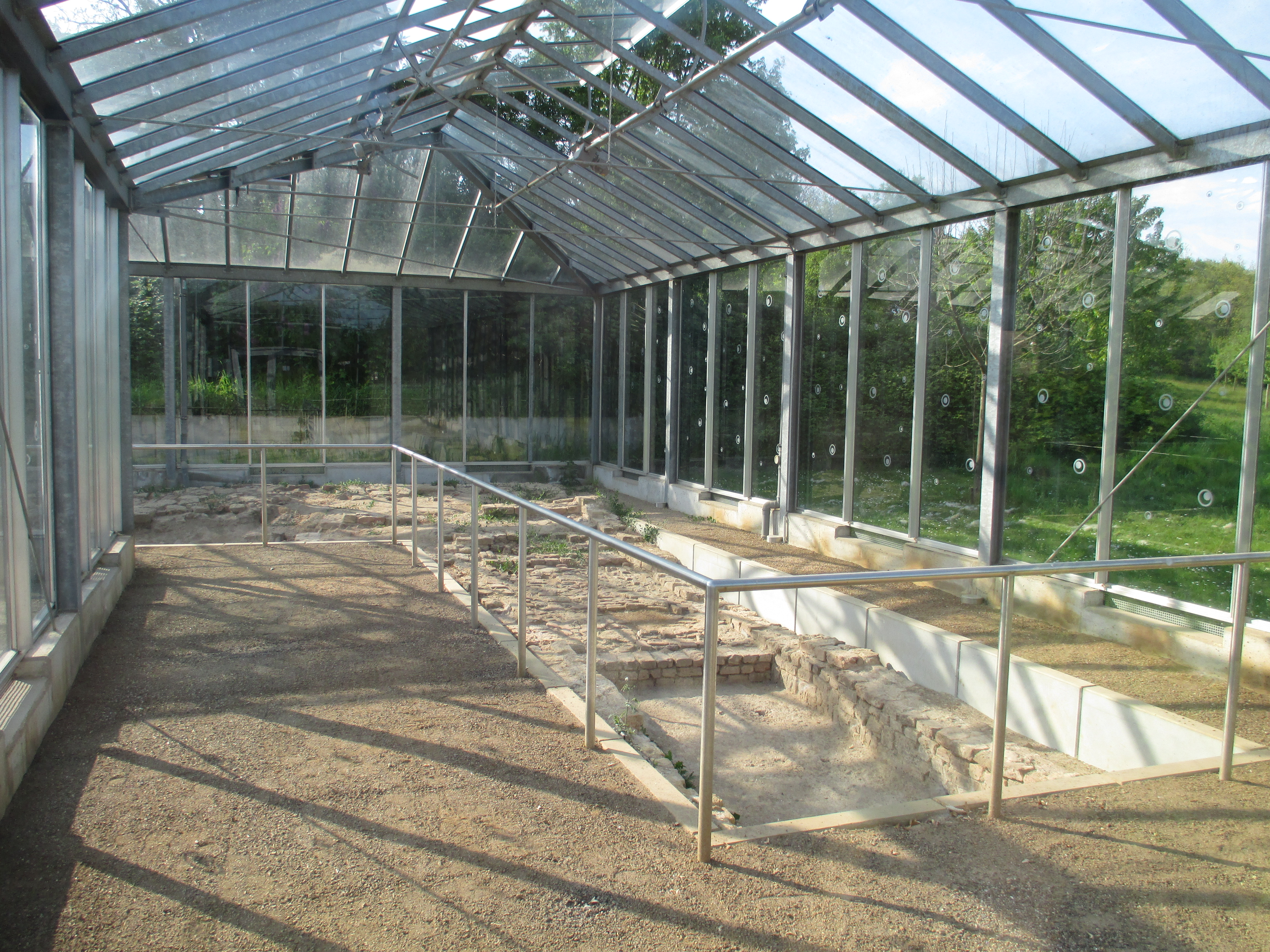 Ausgrabungen am "Alten Garten" im Glashaus.